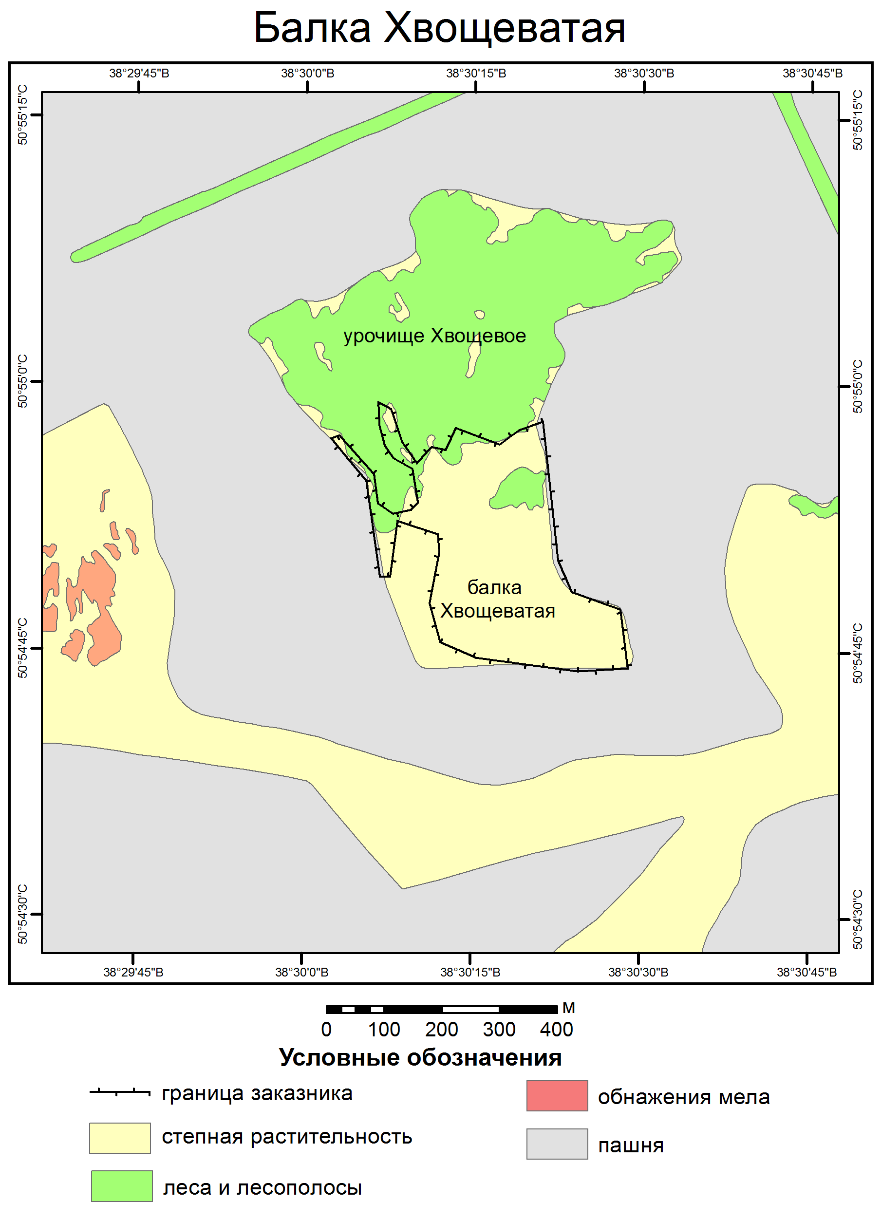 Карта ботанического заказника "Балка Хвощеватая"